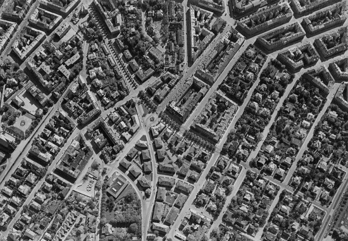 Flyfoto over Oslos vestkant, der Gyldenløves gate med ridestien omgitt av trær i midten ses over en stor del av bildet. Foto: Vilhelms Skappel/Widerøe (1954). Fra Oslo byarkivs samling.